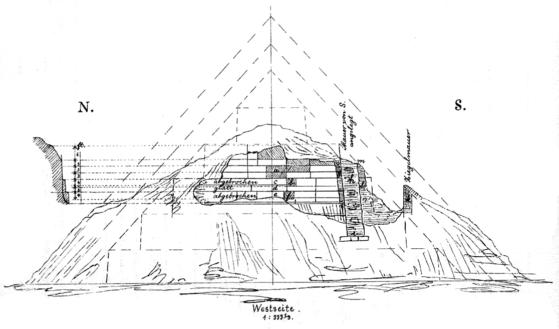 Skizze der Amenemhet-I.-Pyramide, Blick von Westen